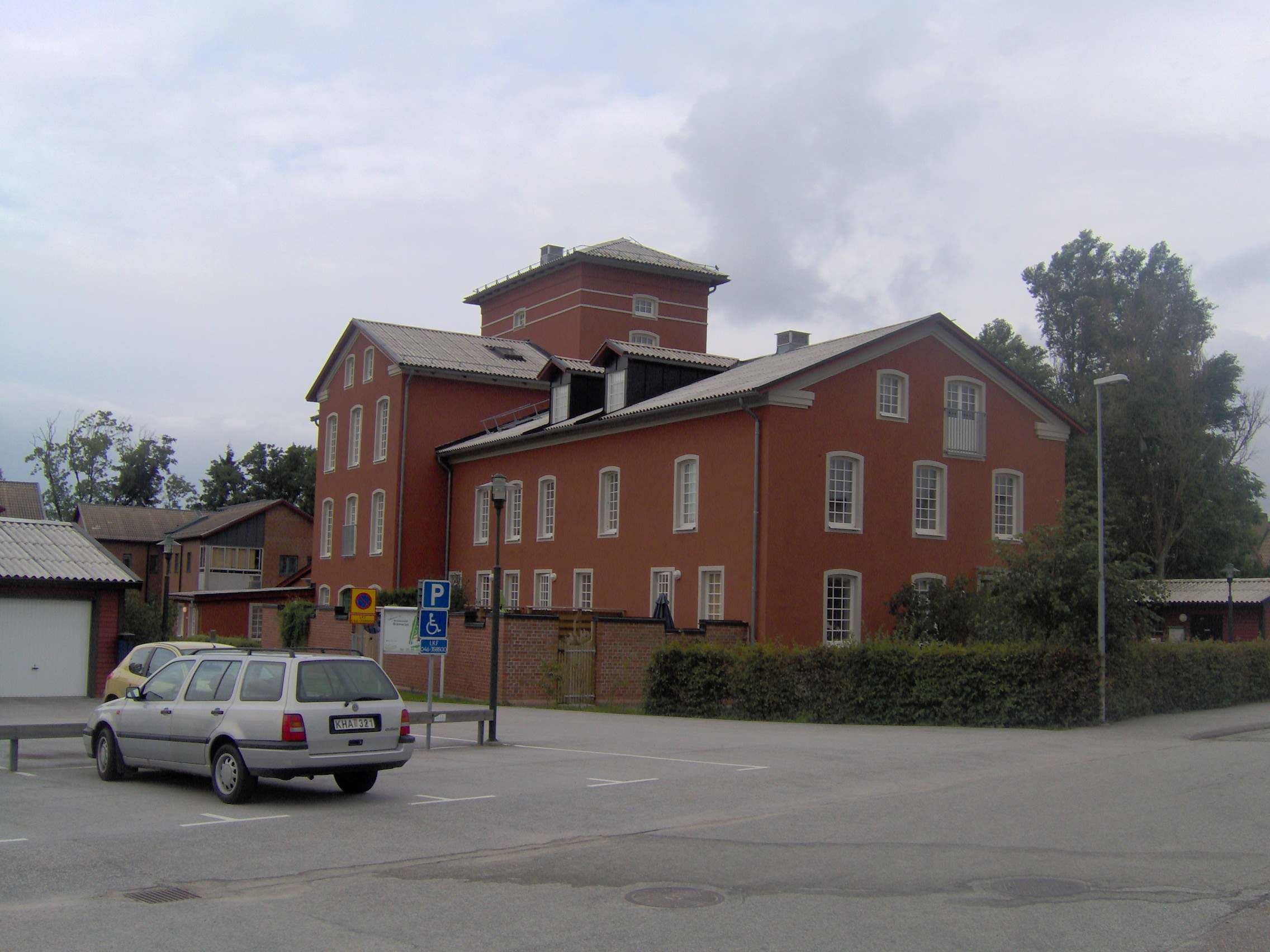 Bränneriet i Södra Sandby, Skåne